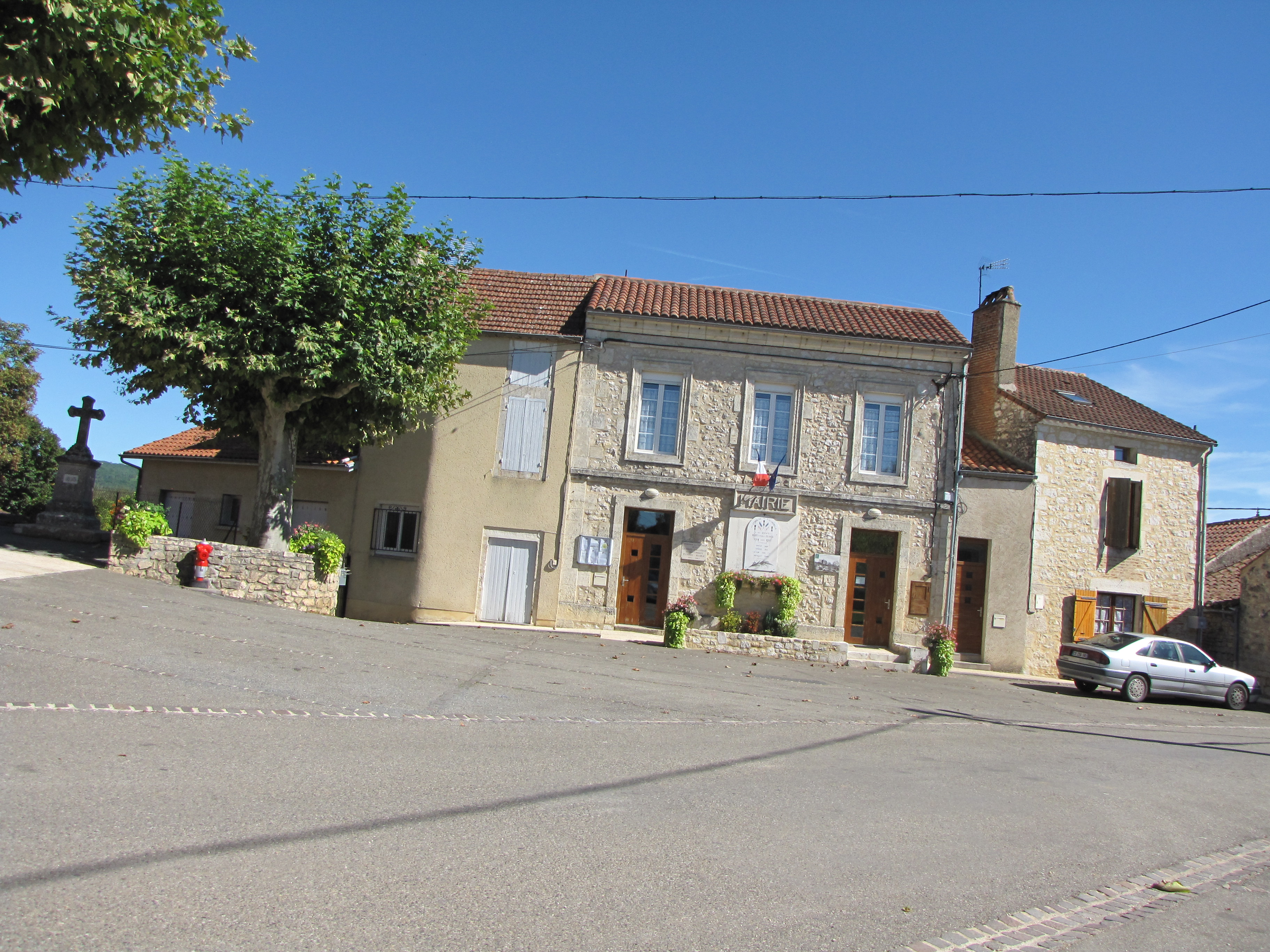 Mairie de Lagardelle